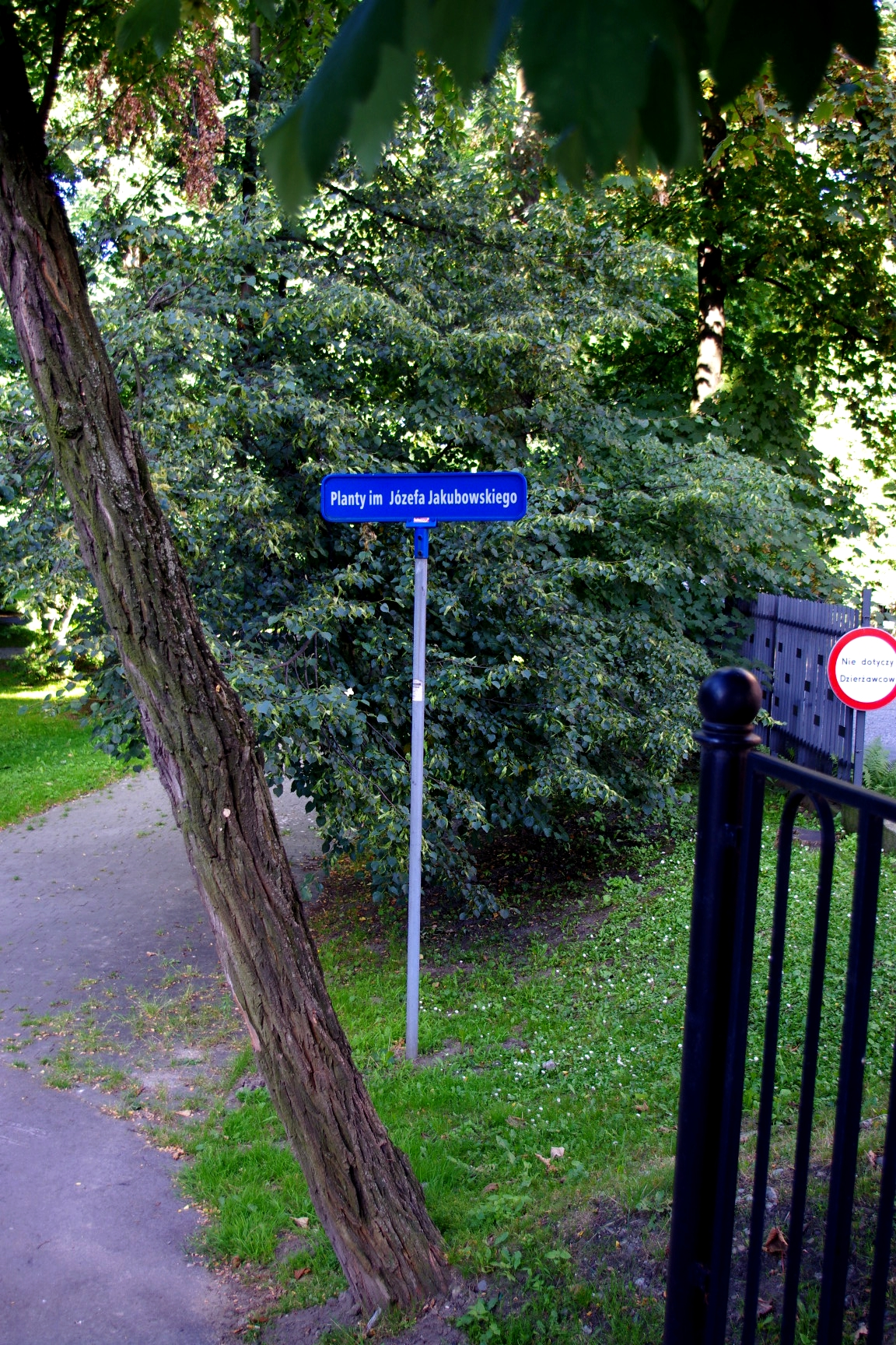 Panty im. Józefa Kazimierza Jakubowskiego w Tarnowie